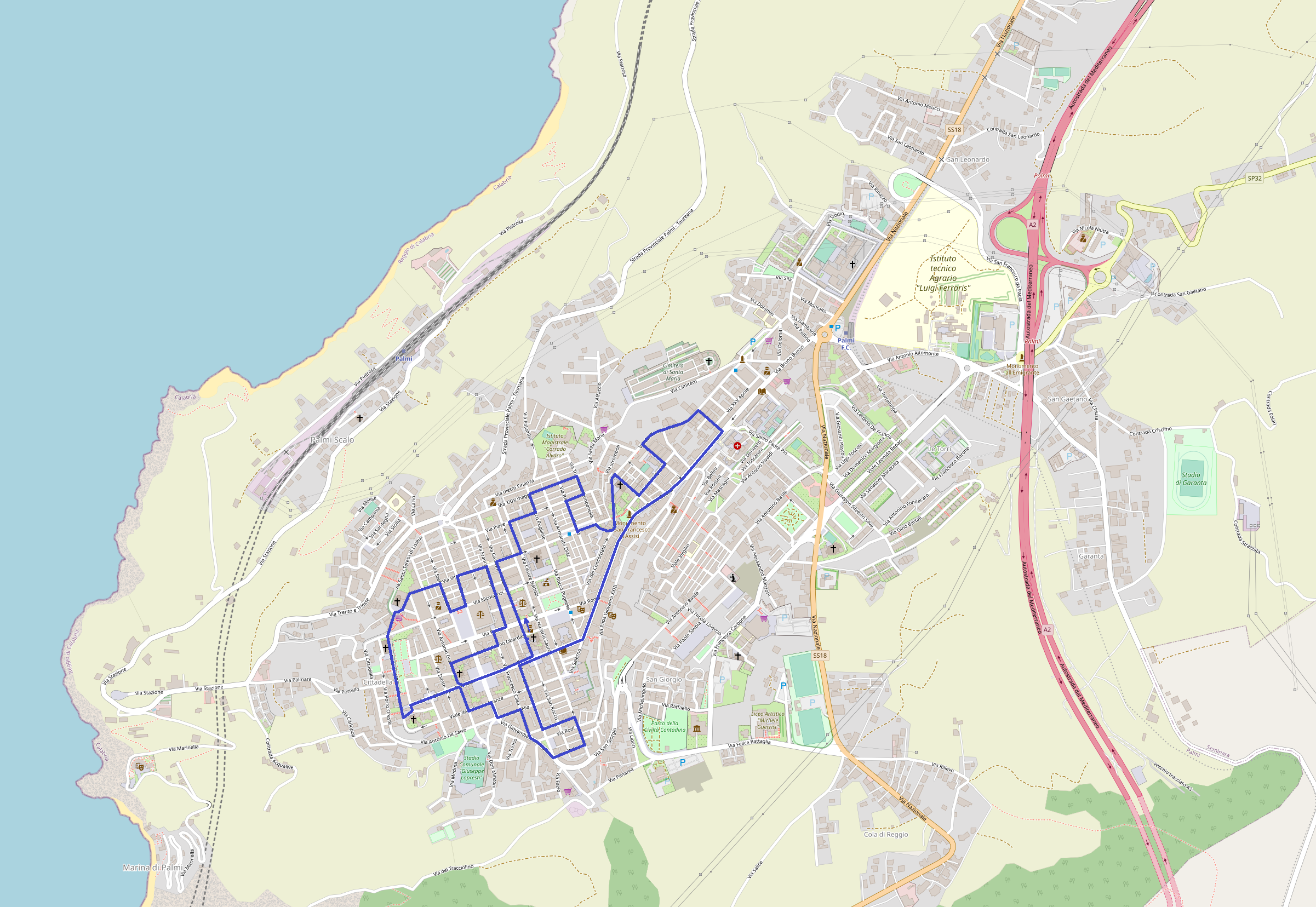 Percorso storico della processione di Maria Santissima Immacolata per le vie di Palmi, il pomeriggio di ogni 8 dicembre.